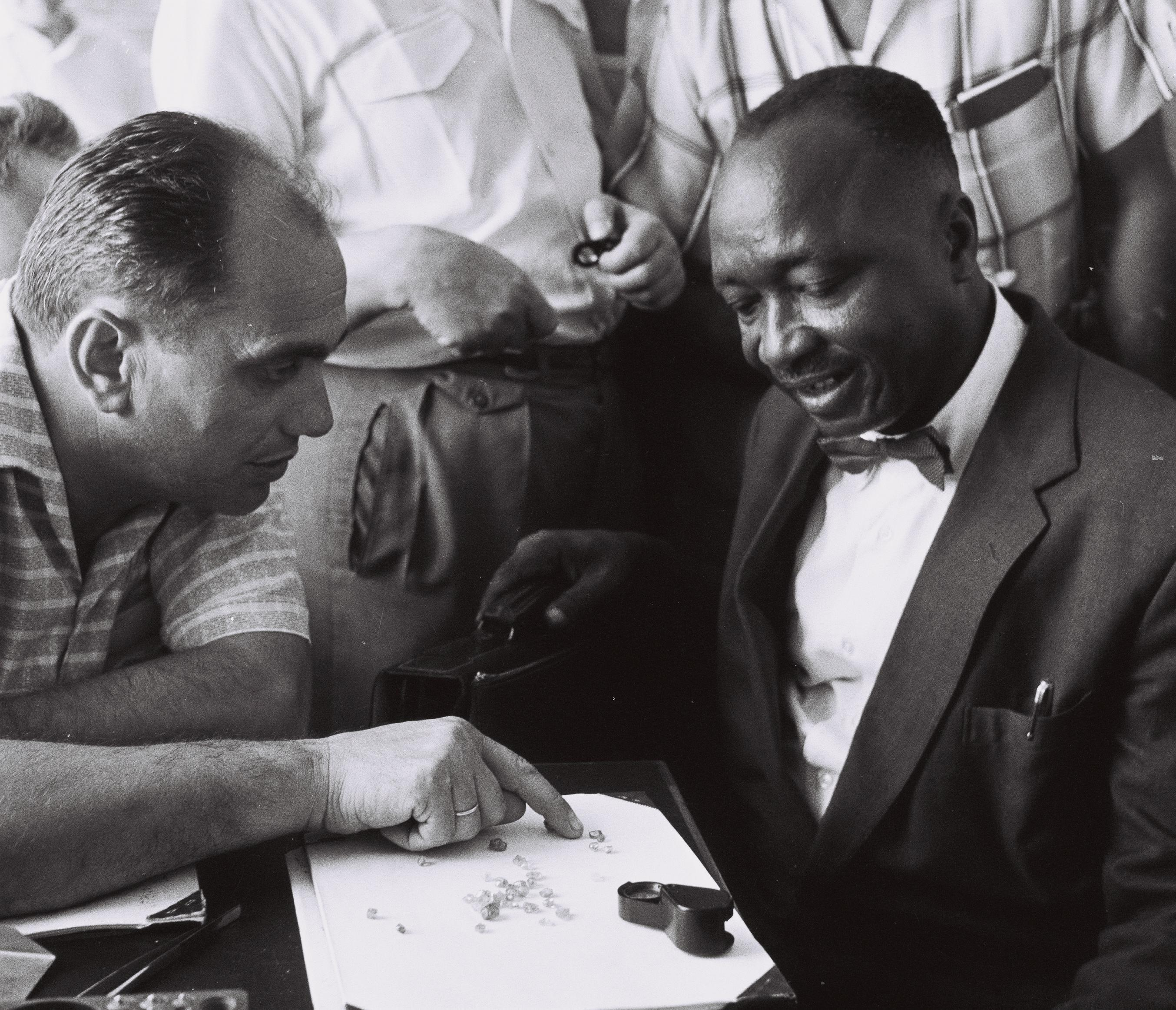 R.D. Sesay Min. Of Information of Sierra Leone in an official delegation at the diamond exchange in Tel Aviv. ר.ד ססאי, השר לענייני מידע של סיירה ליאון בפגישה רשמית בבוררסה ליהלומים ברמת גן